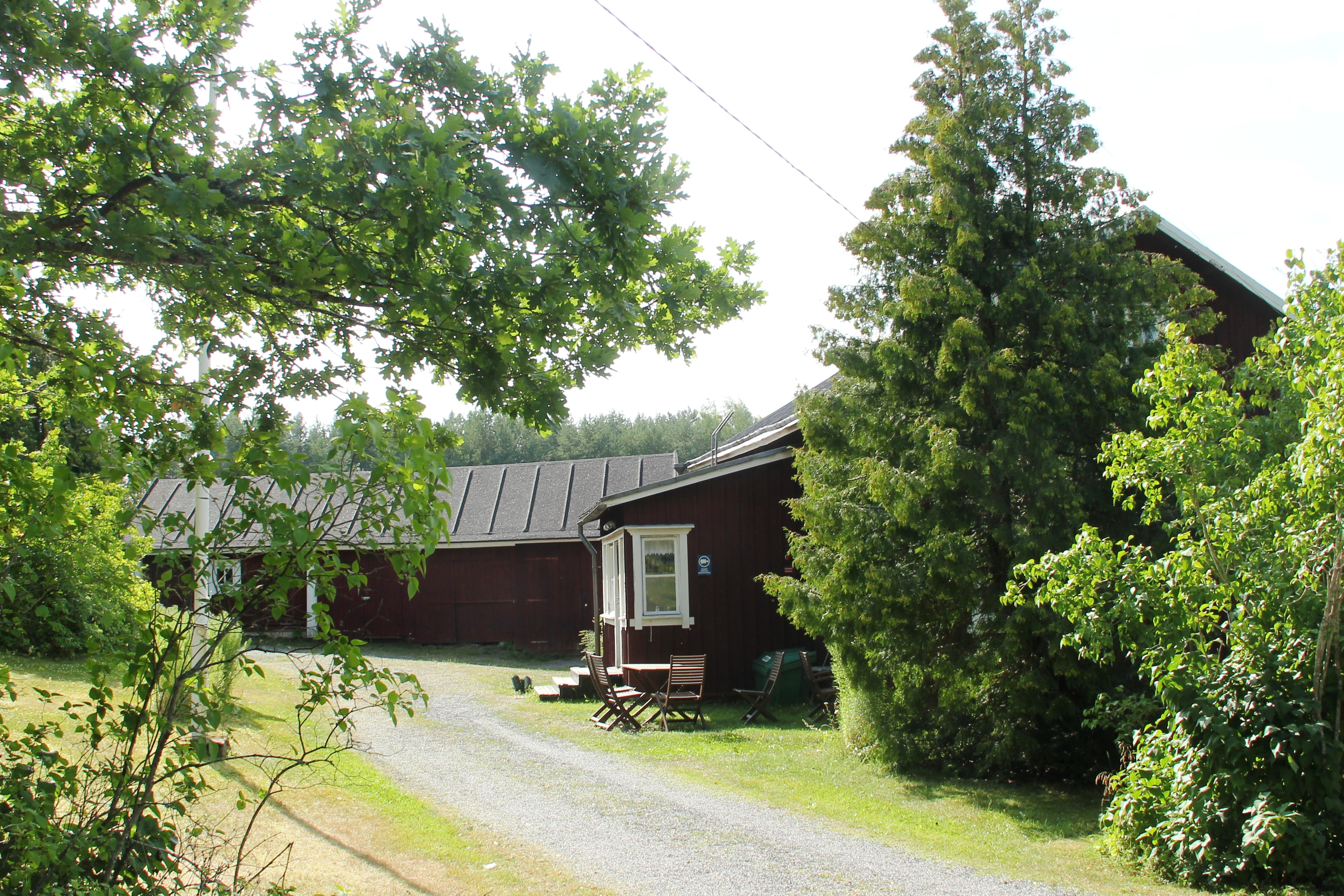 Vanhan seurakunnan kanttorila Linnanrauniontien varrella kirkon takana.